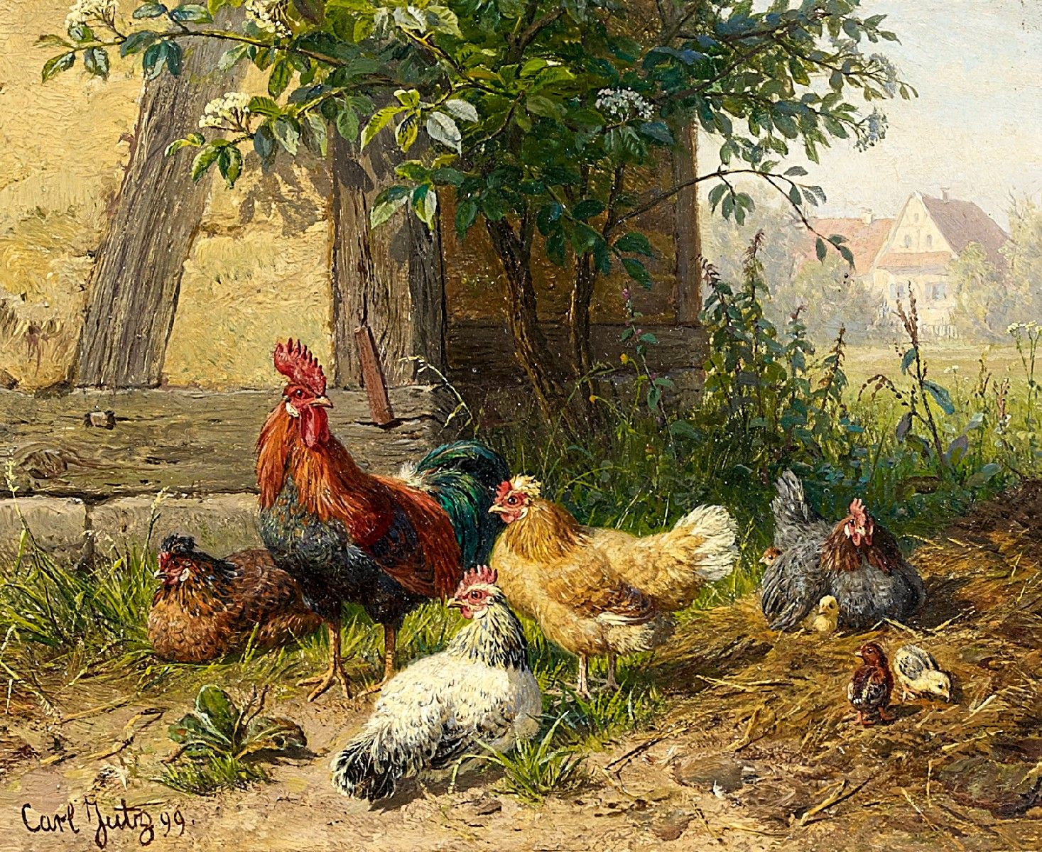 Hühner. Signiert und datiert unten links: Carl Jutz 99. Öl auf Mahagoni. 13,5 x 17 cm.